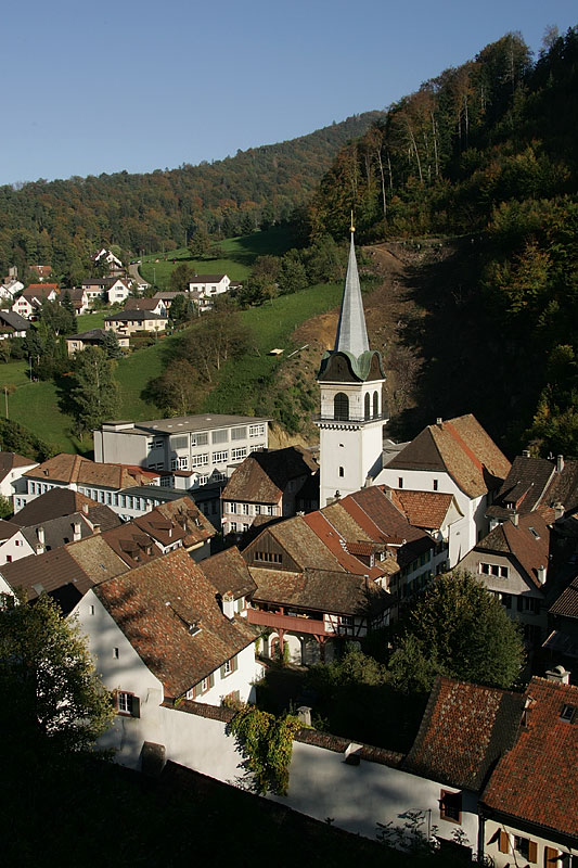 Waldenburg